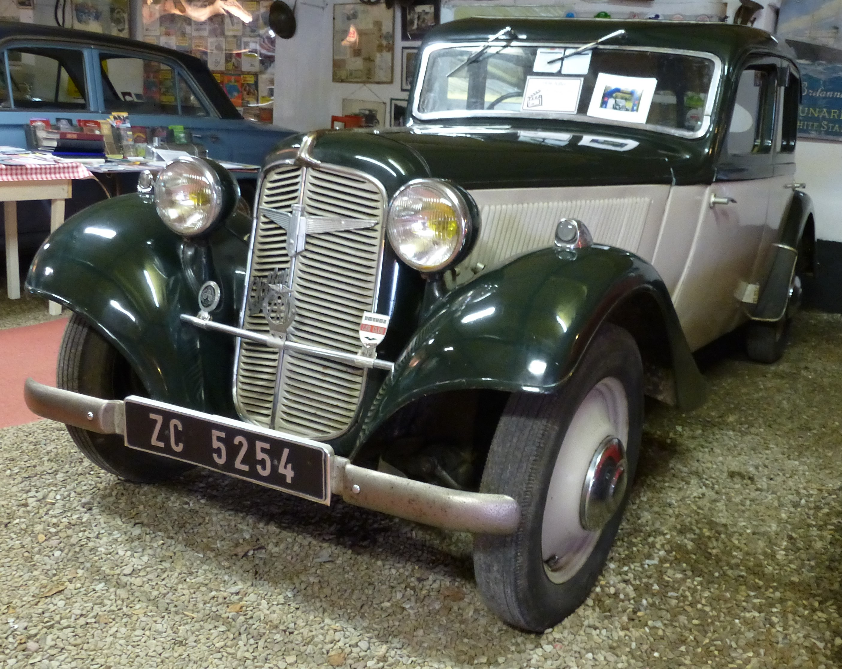 Adler Trumpf Junior von 1936 von Irish Exporters & Importers aus Irland